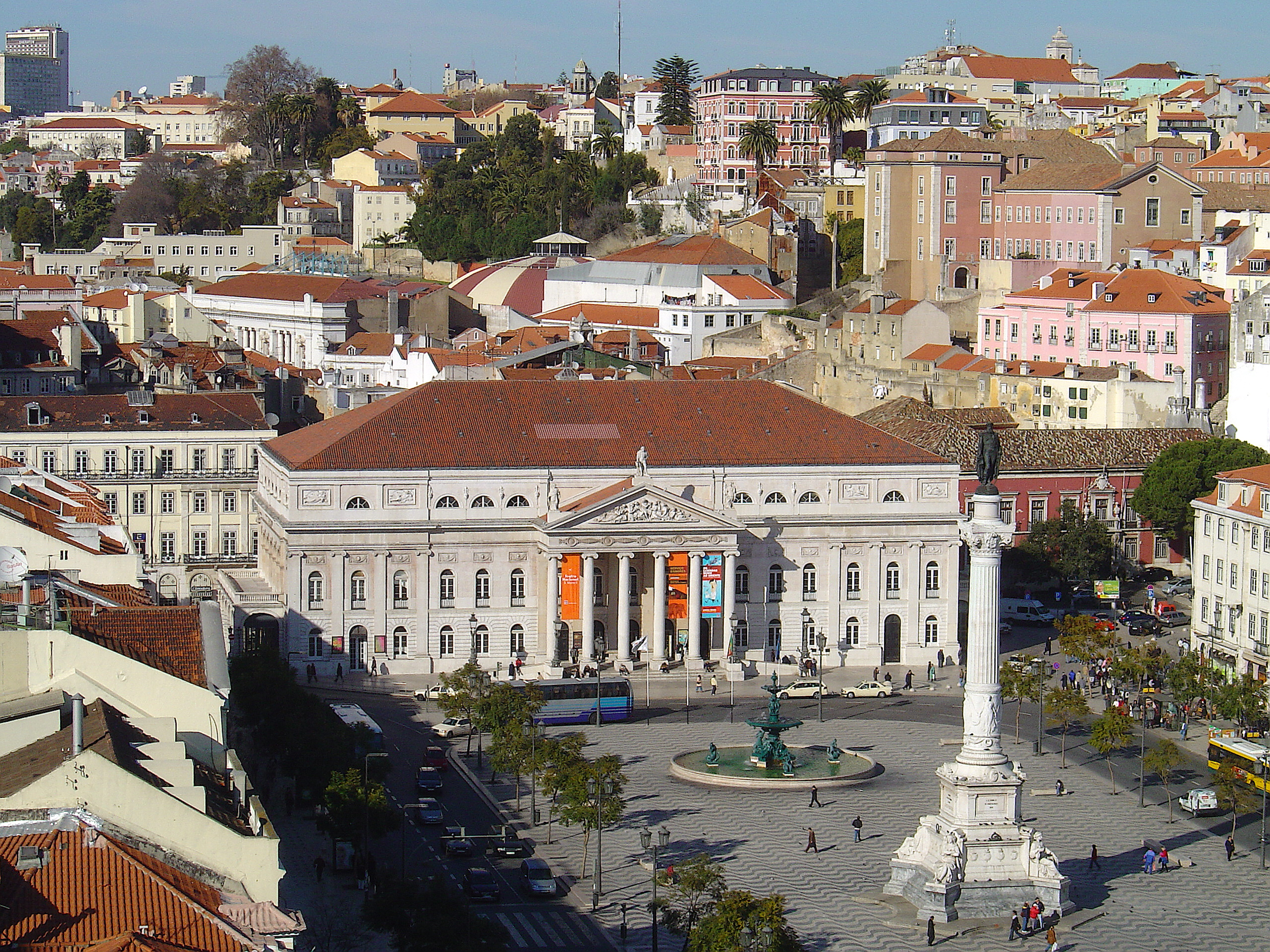 Vista do Miradouro de Sta. Justa - Lisboa (Portugal)